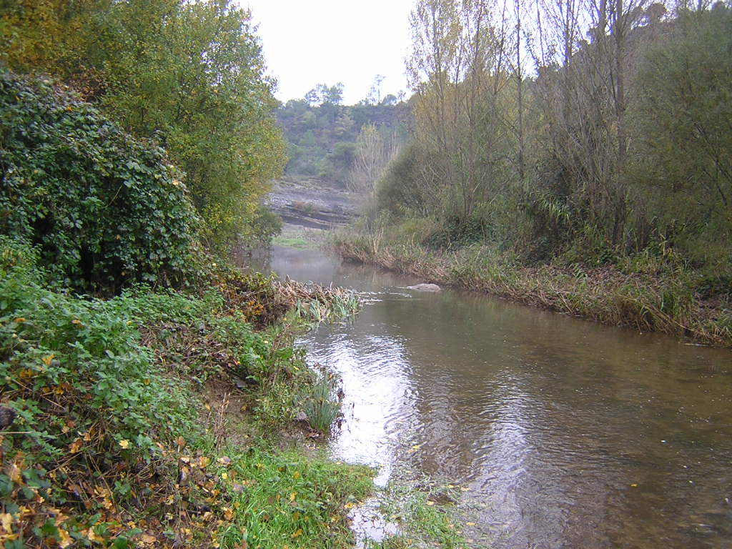 La Golarda (Castellcir i Monistrol de Calders, Moianès)